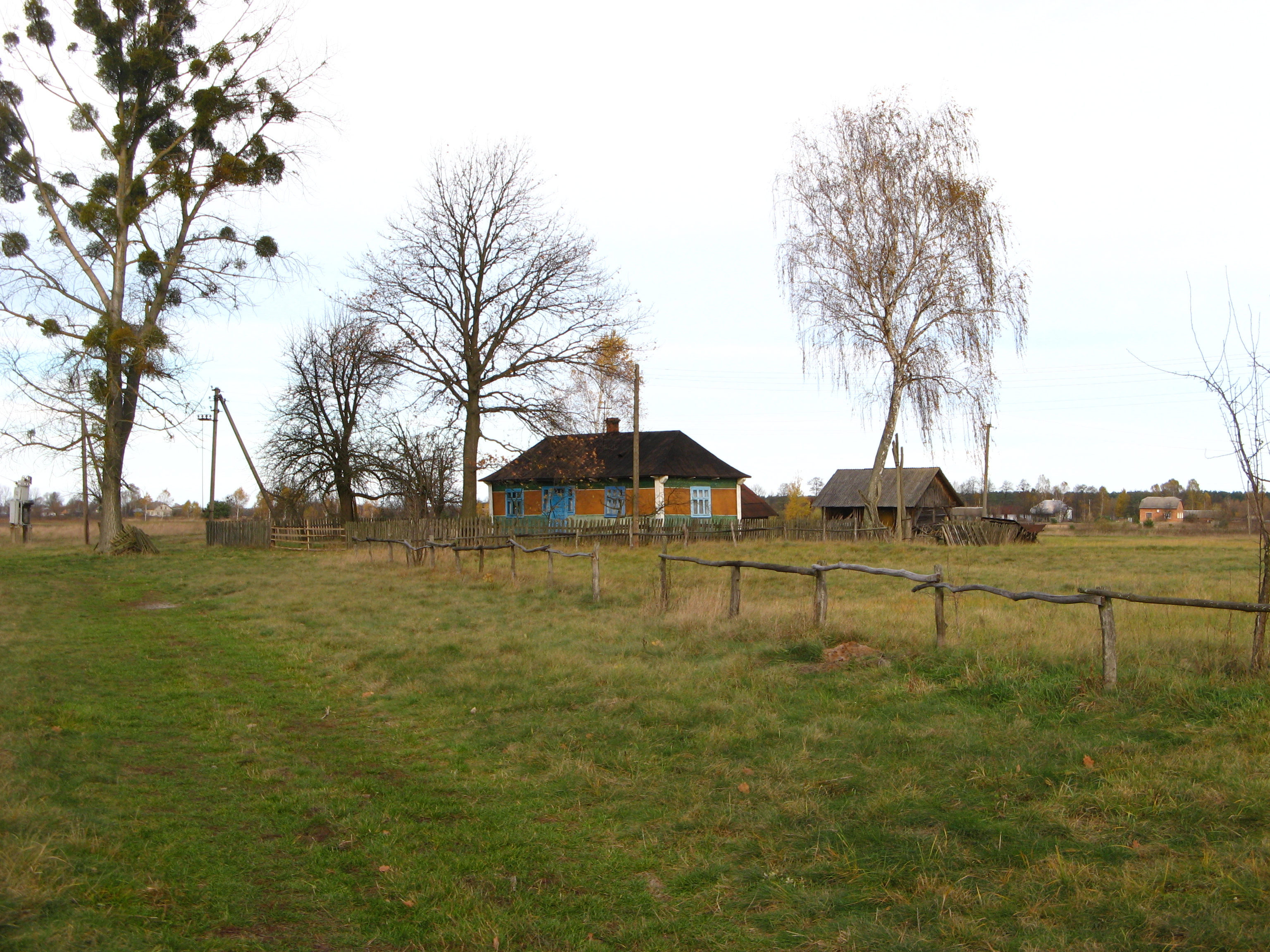 Хутір Гризи у селі Топорові (Буський р-н., Львівська обл.)